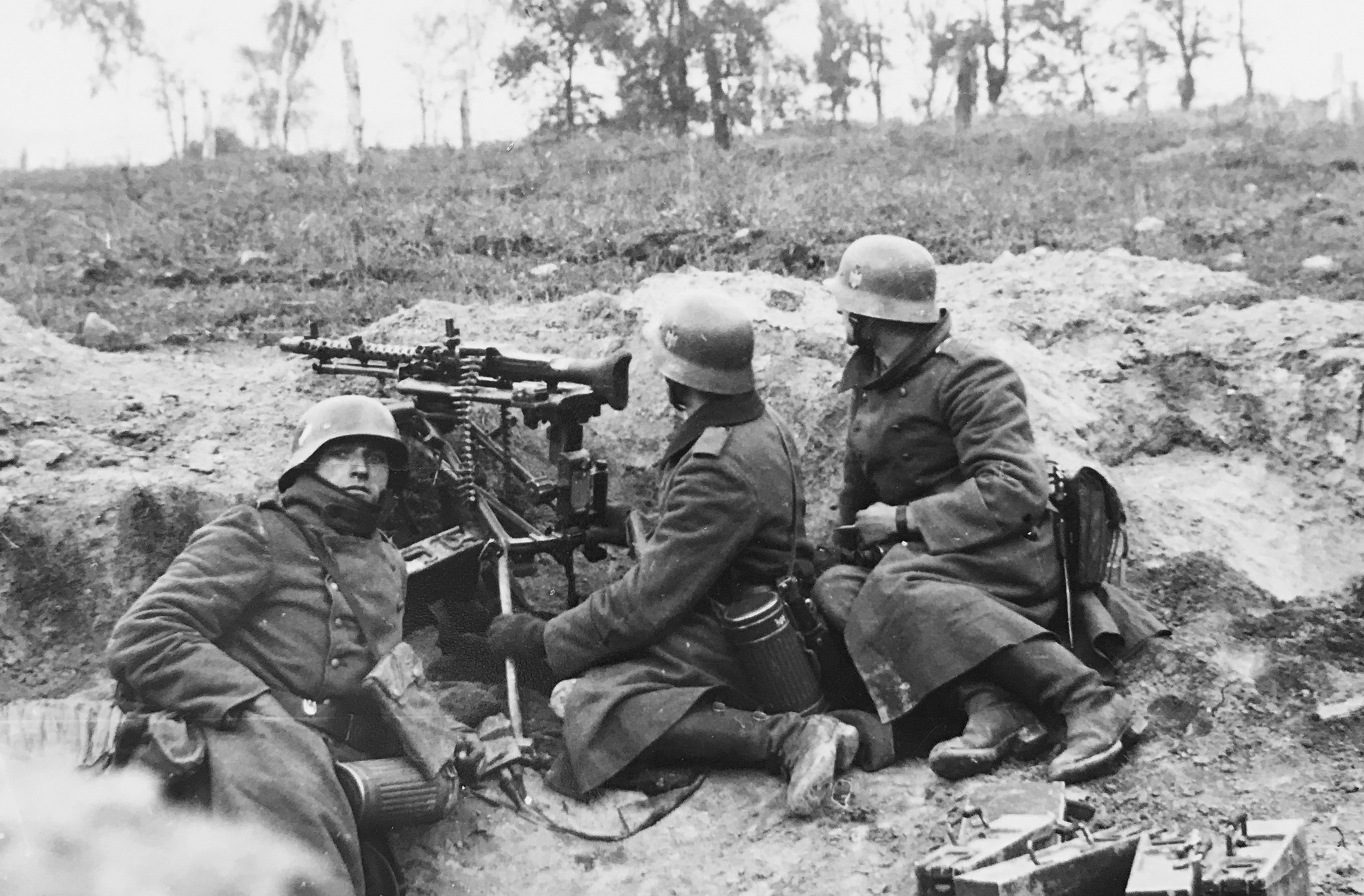 Deutsches MG 34 auf Drei-Bein-Lafette montiert.